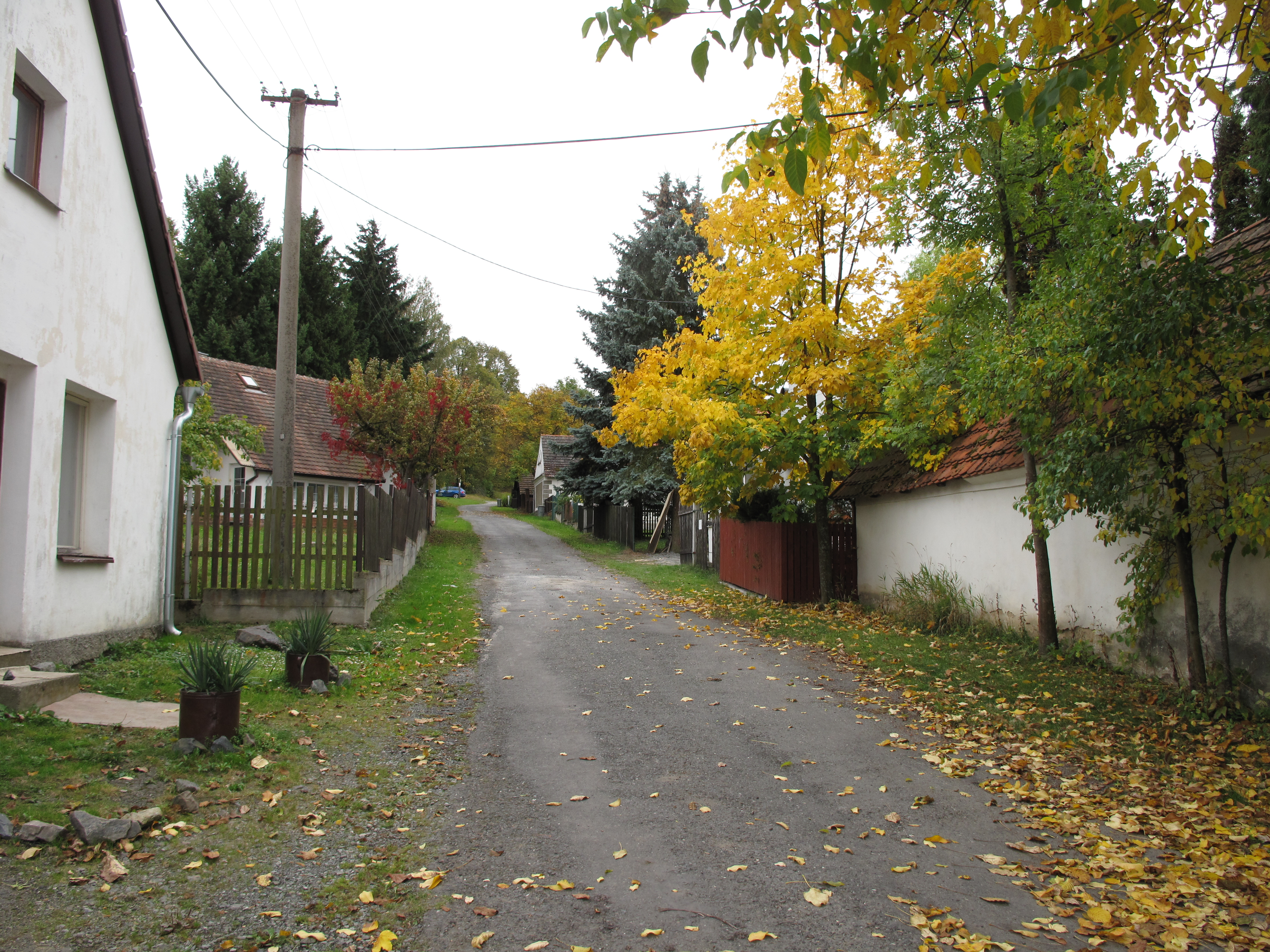 Kaliště (Švihov). Okres Klatovy, Česká republika.